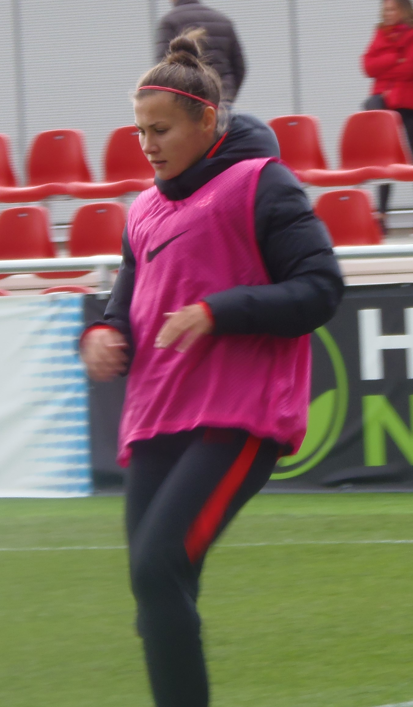 Olga Ovdychuk calentando en octubre de 2019 antes del partido de liga contra el Madrid CFF